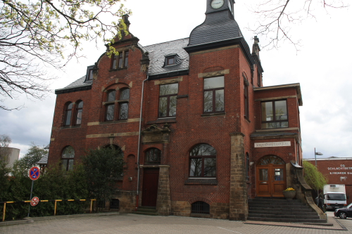 Ehemaliges Bürogebäude des Schlachthofes in Düren, Paradiesstr.